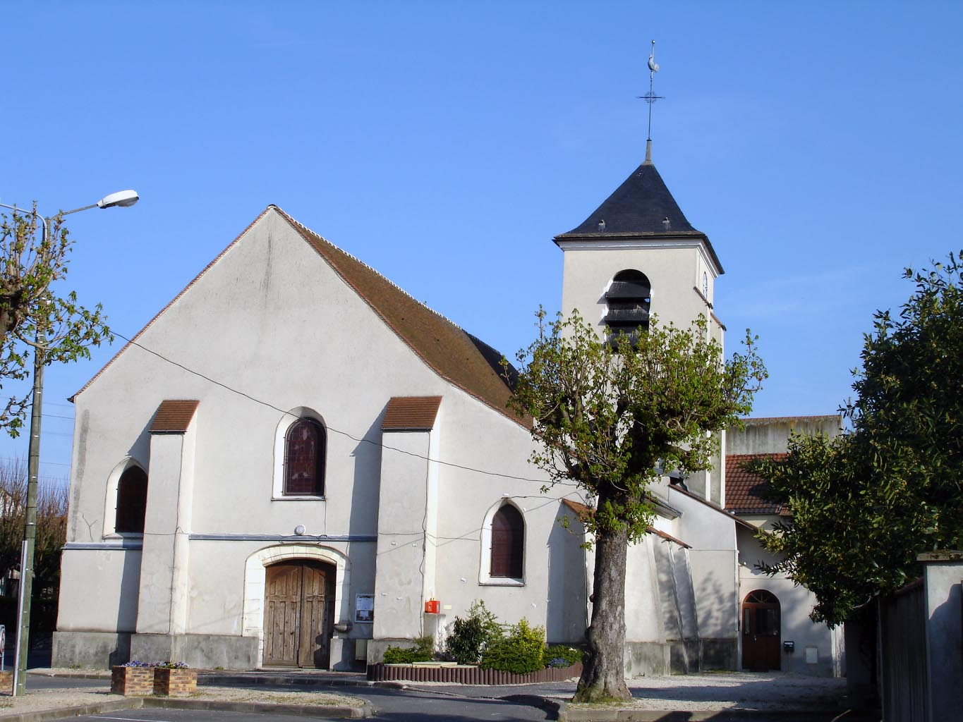 Facade de l'église du Pin (Seine-et-Marne), France